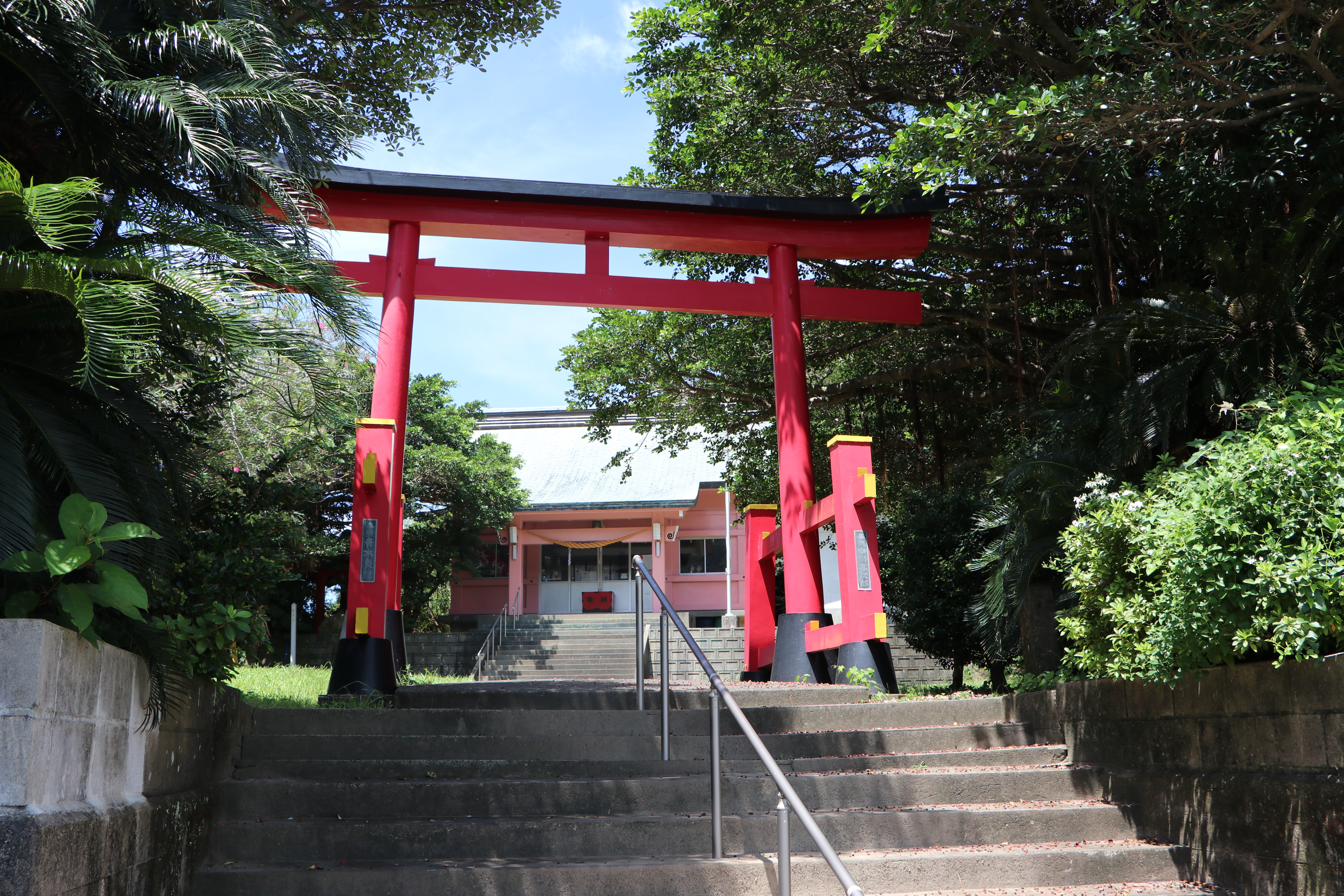 南さつま市坊津町泊にある九玉神社